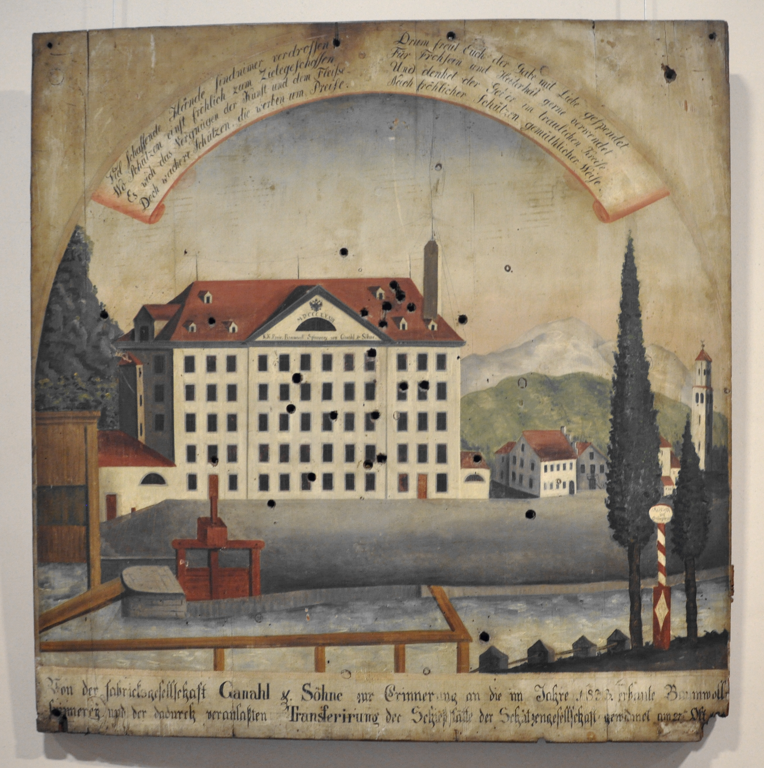 Schützenscheibe der k. k. Stadtschützengesellschaft Feldkirch mit dem Fabrikgebäude der k. k. priv. Baumwollspinnerei Ganahl & Söhne, 1833 Bregenz, Vorarlberg Museum; Leihgabe der Hauptschützengilde Feldkirch vorarlberg museum Native namevorarlberg museumLocationBregenz, Vorarlberg, AustriaCoordinates47° 30′ 16″ N, 9° 44′ 48″ E Established1857WebsiteVorarlberg Museum website